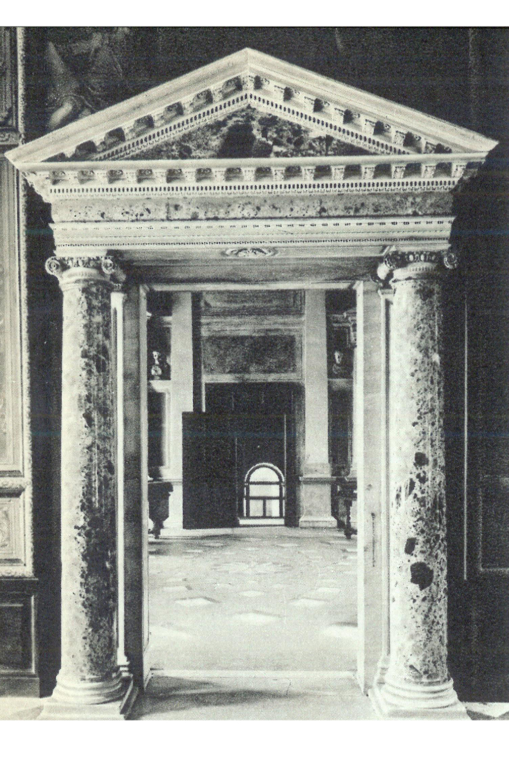 Es la entrada a la Biblioteca, obra de Jacopo Sansovino, con un arquitrabe convexo y un frontón triangular, inspirados en la arquitectura tardoromanaa.